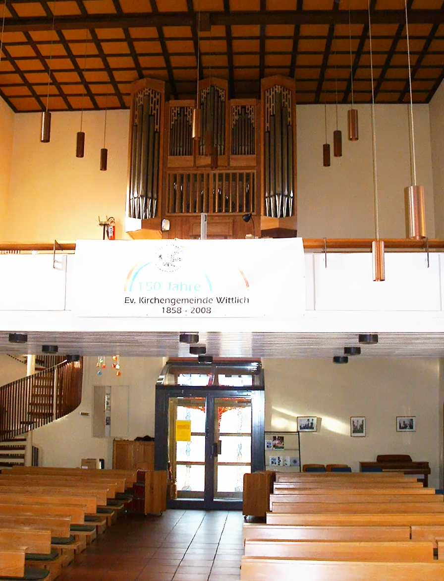 Christuskirche Wittlich, Orgel